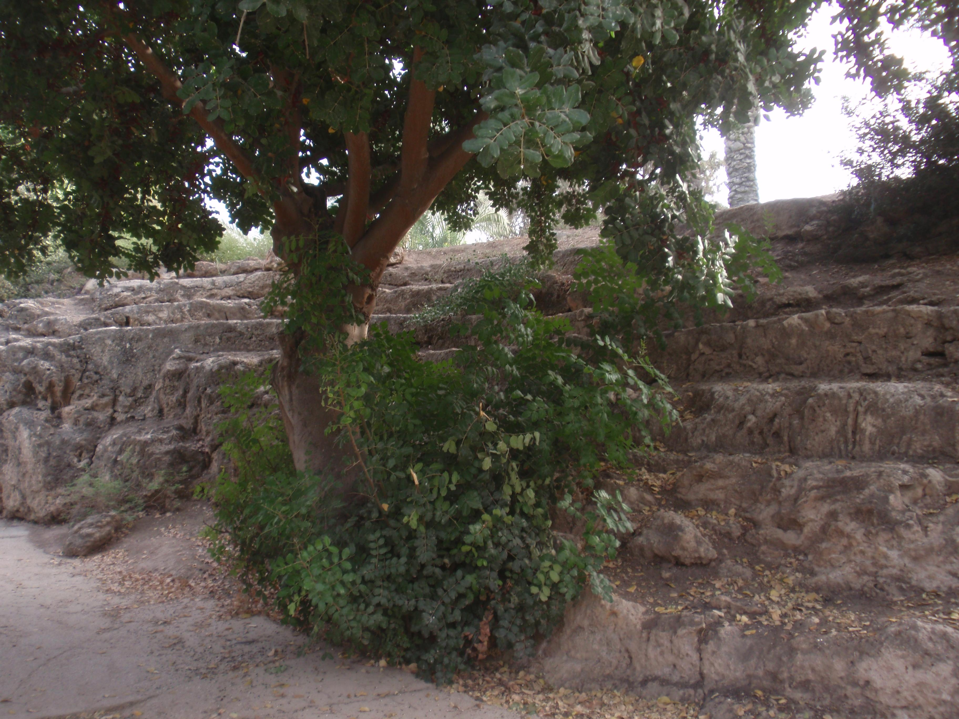 Naumachia in Gan ha-Shlosha Israel